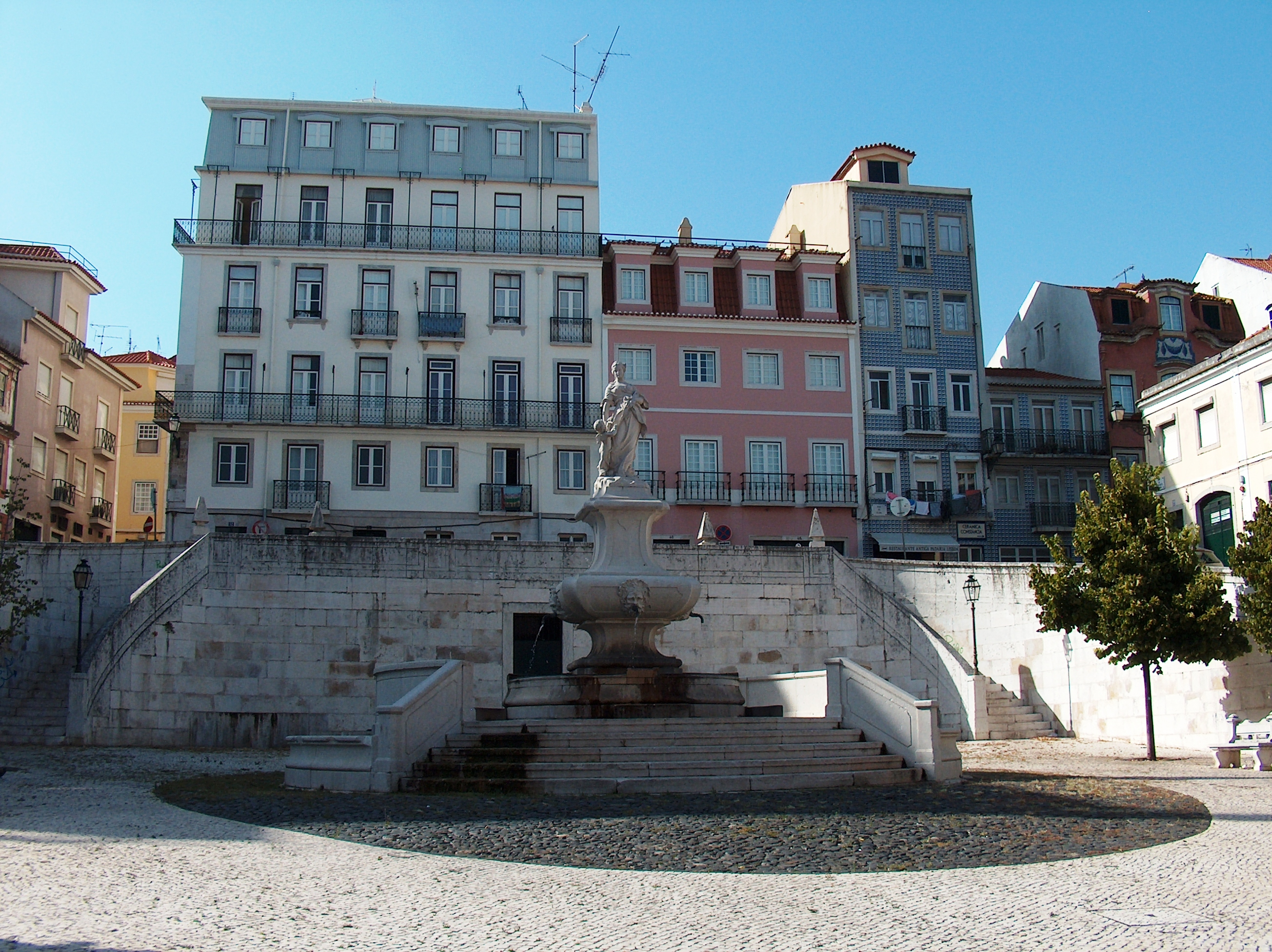 Chafariz das Janelas Verdes, Largo Dr. José de Figueiredo, Lisboa - Portugal.